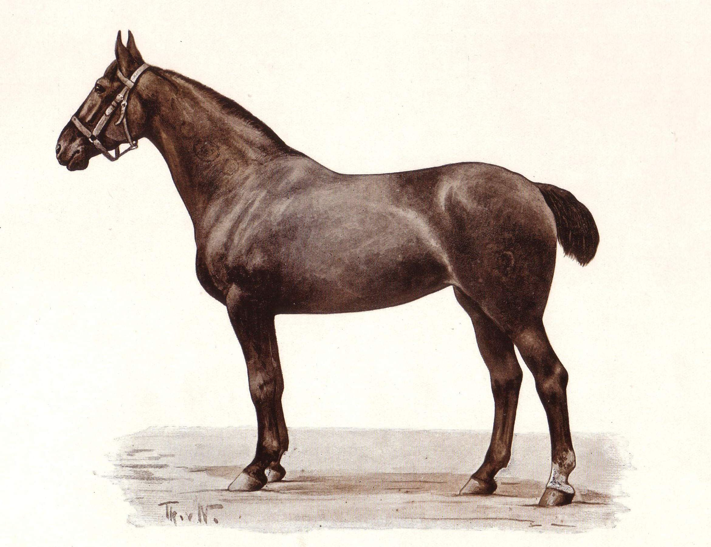 Oldenburger Marschschlag. Braune Stute. "Cremone", geb 1894 in Bardenfleth (Oldenburg)